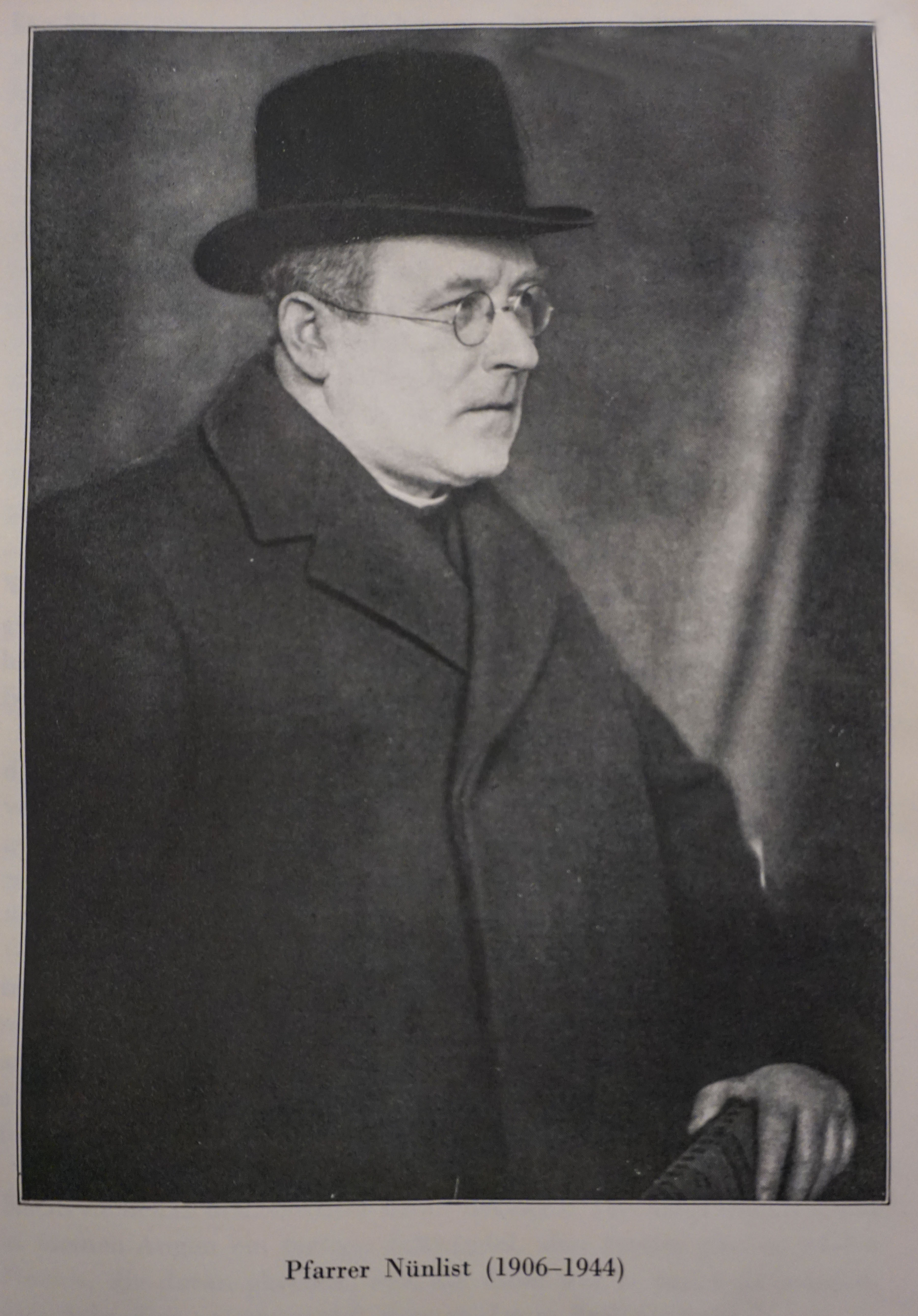 Portrait von Pfarrer Josef Emil Nünlist aus dem Buch: 150 Jahre römisch-katholische Gemeinde Bern ; 50 Jahre Dreifaltigkeitskirche : Jubiläumsschrift, von 1949